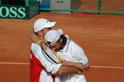 Тодор Енев и Ивайло Трайков; "Тежка но сладка бе победата!"; Пловдив, Купа Дейвис: България - Кипър 3:2; 2007 Пламен Ташев, Тенис